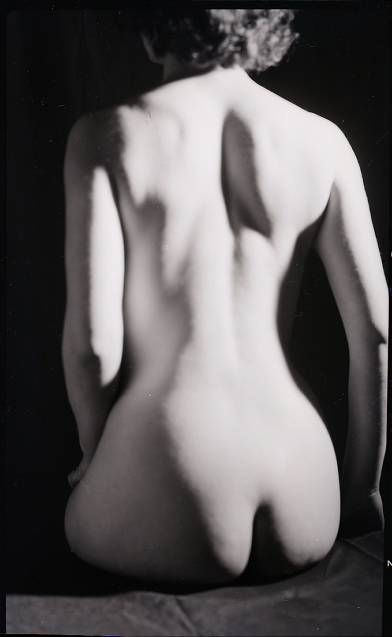 Nudo femminile. Schiena. Sfocature e solarizzazioni. Serie fotografica : Italia, 1960 / Paolo Monti. - Buste: 2, Fototipi: 2 : Negativo b/n, gelatina bromuro d'argento/ pellicola ; 6x8, 6x9. - ((Serie costituita da 2 buste di negativi identificati con i nn.: 4951, 4952, e tenute insieme da una graffetta. - Sulla busta identificata con il n. 4951 iscrizione didascalica manoscritta a pennarello e a matita: "Nudi". - La suddetta serie è contenuta nella scatola R4558-4950 (+ 51 e 52), formato 18x24, e identificata con l'iscrizione didascalica manoscritta a pennarello nero: "Ritratti di donne"